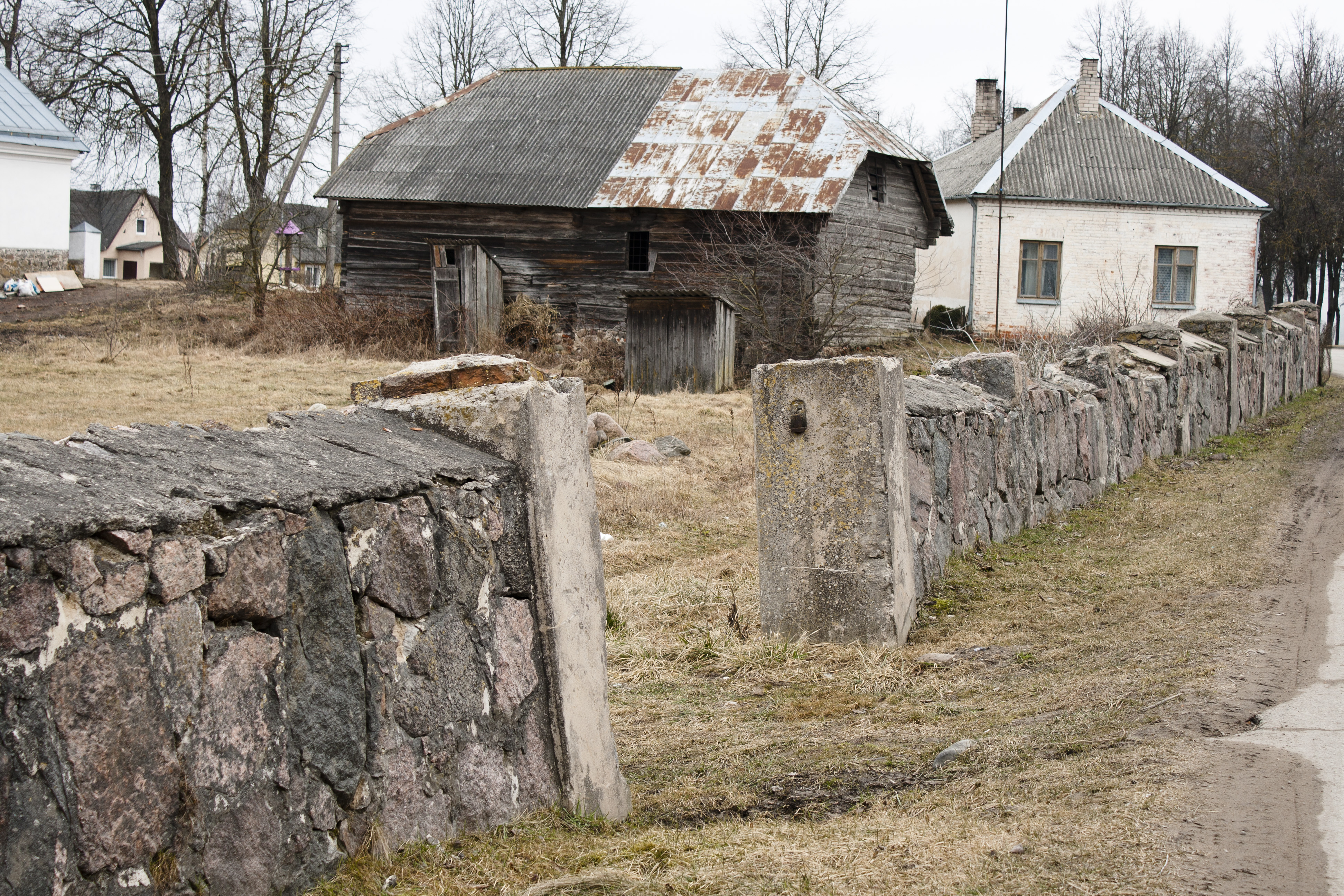 Pumpenai